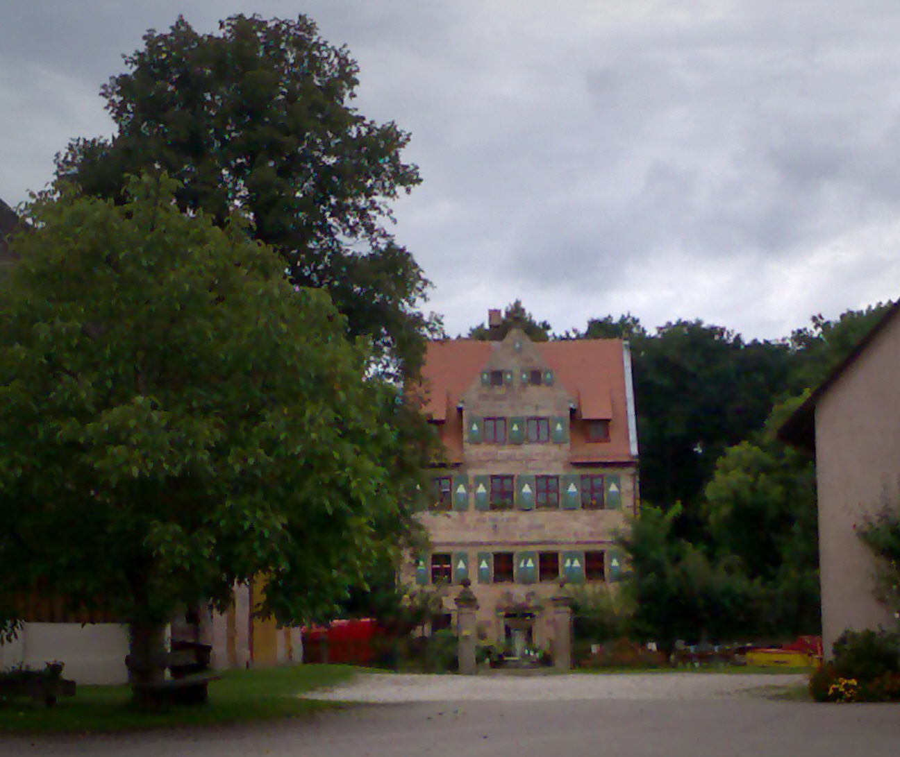 Herrensitz Waldstromer-Schlösschen in Reichelsdorf bei Nürnberg - Schalkhauser Straße 24-28